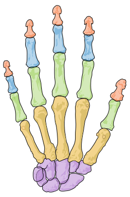 Hand (anatomie) zonder labels